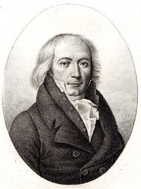 Pierre Hyacinthe Azais (1766-1845)